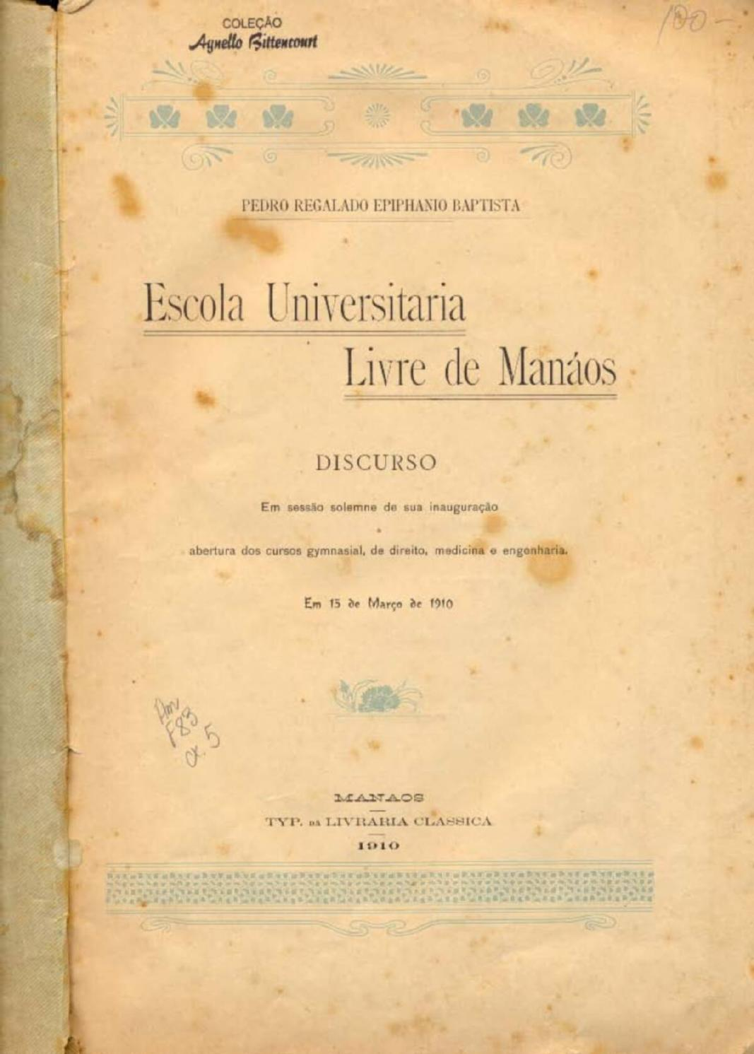 Discurso em sessão solene de sua inauguração: abertura dos cursos ginasial, de Direito, Medicina e Engenharia.